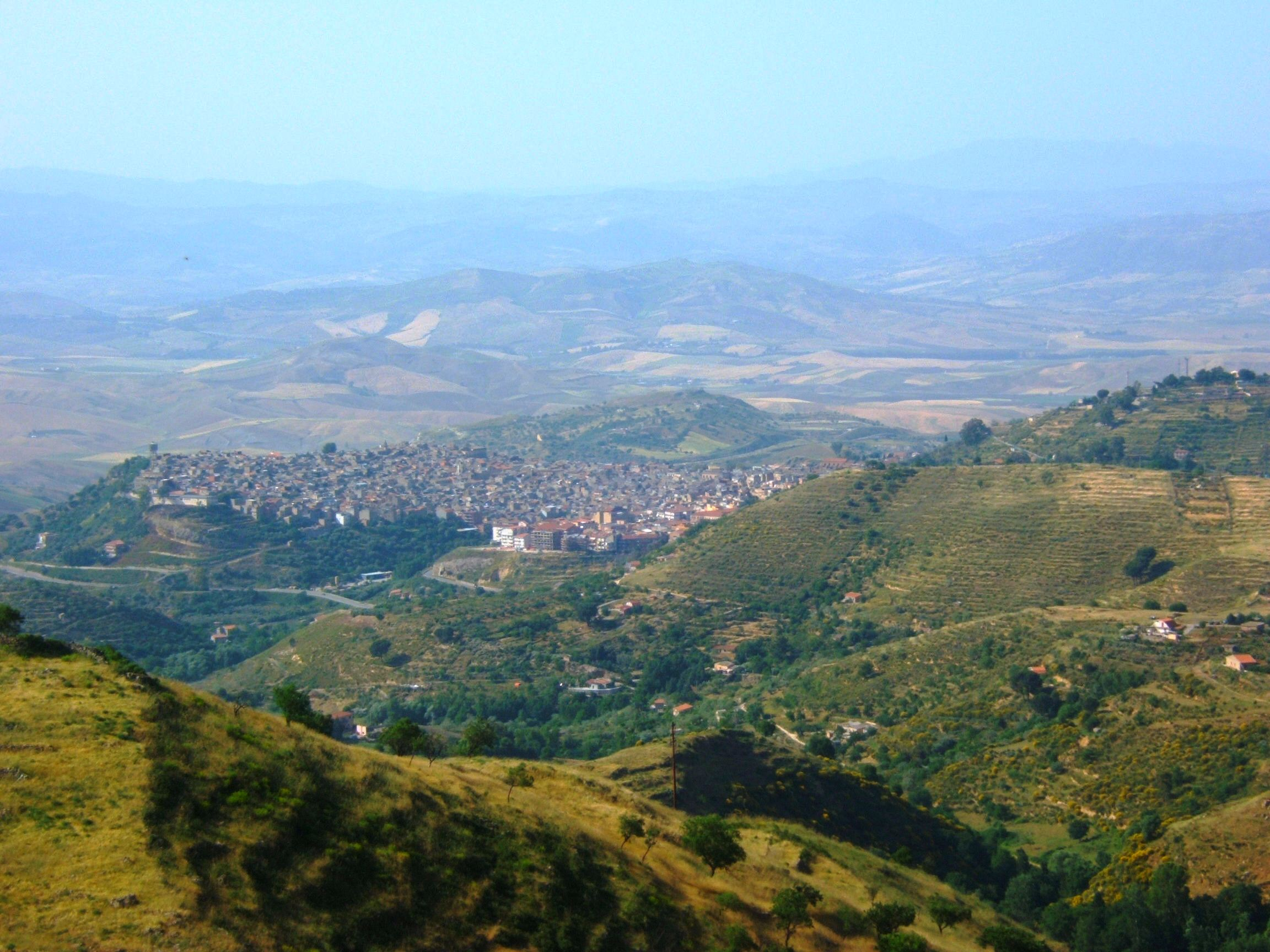 Veduta di Valguarnera dal Monte Rossomanno, foto di Carmelo Parrinelli